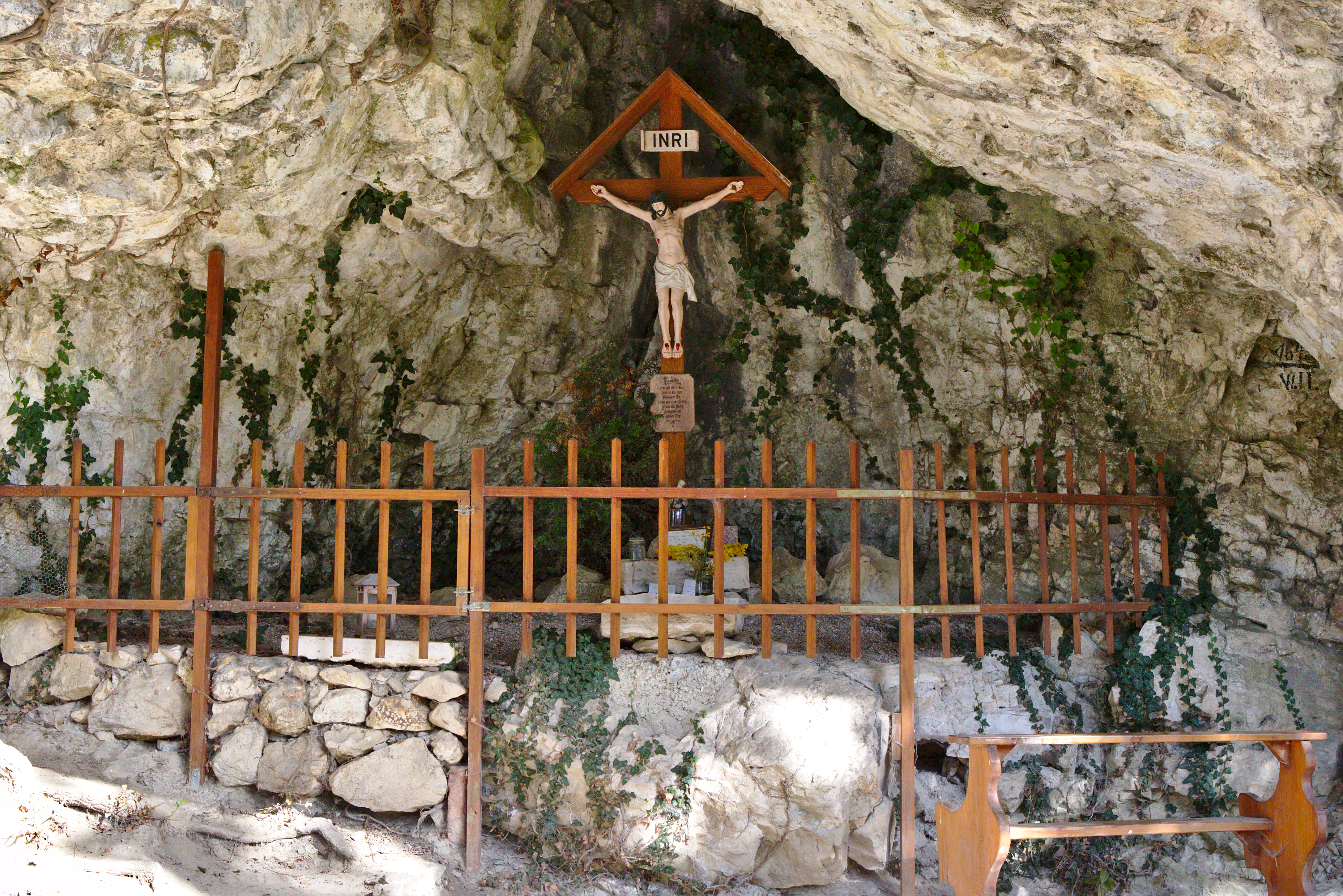 Grotte unterhalb des Arco-Schlößchen N von Neuburg. Geotop 185H002